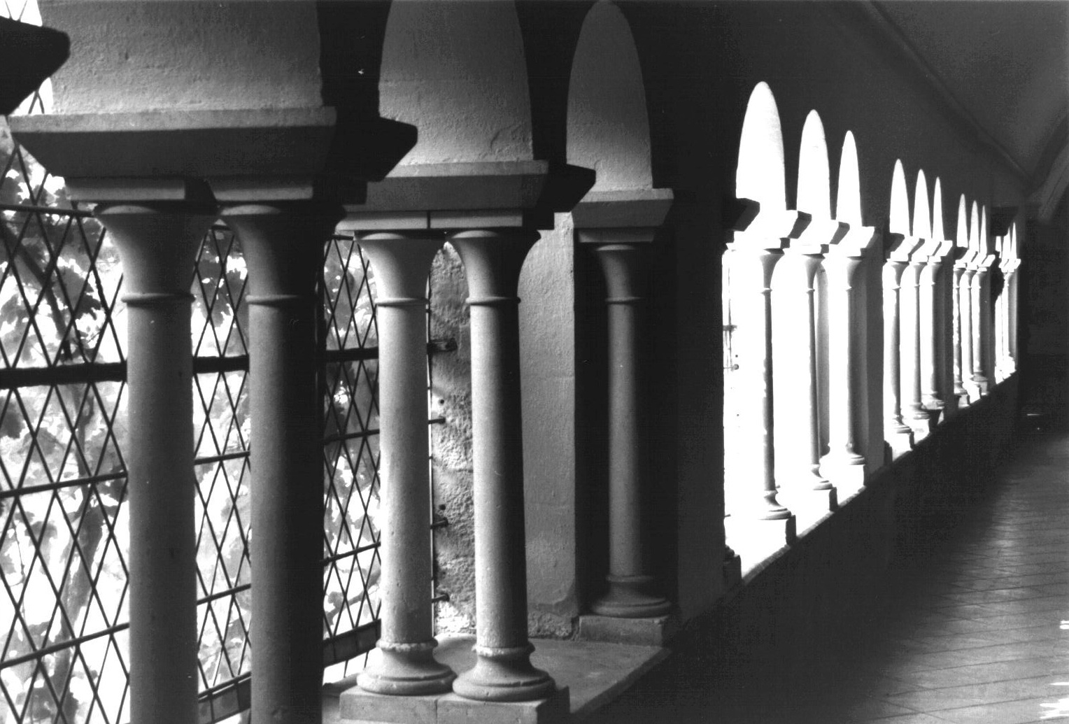 Vitrail de l'Abbaye de Bonnecombe, cloître, (du temps de la communauté de l'Arche).